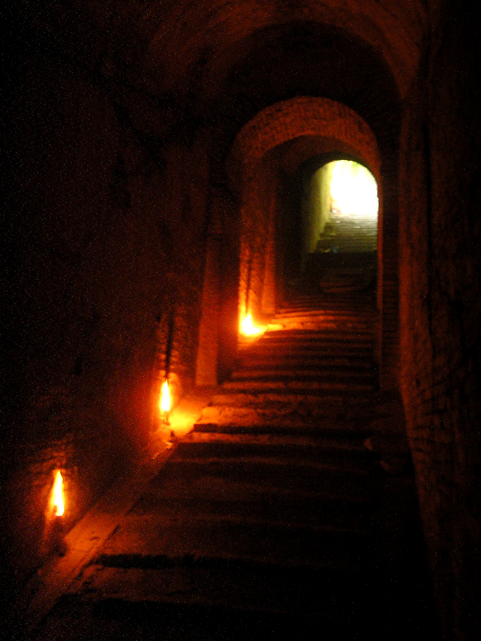 Scorcio dello scalone d'ingresso dei sotterranei del Bastione Gregoriano della Cittadella di Ancona, fortificazione rinascimentale di Antonio da Sangallo il Giovane costruita nel 1532.